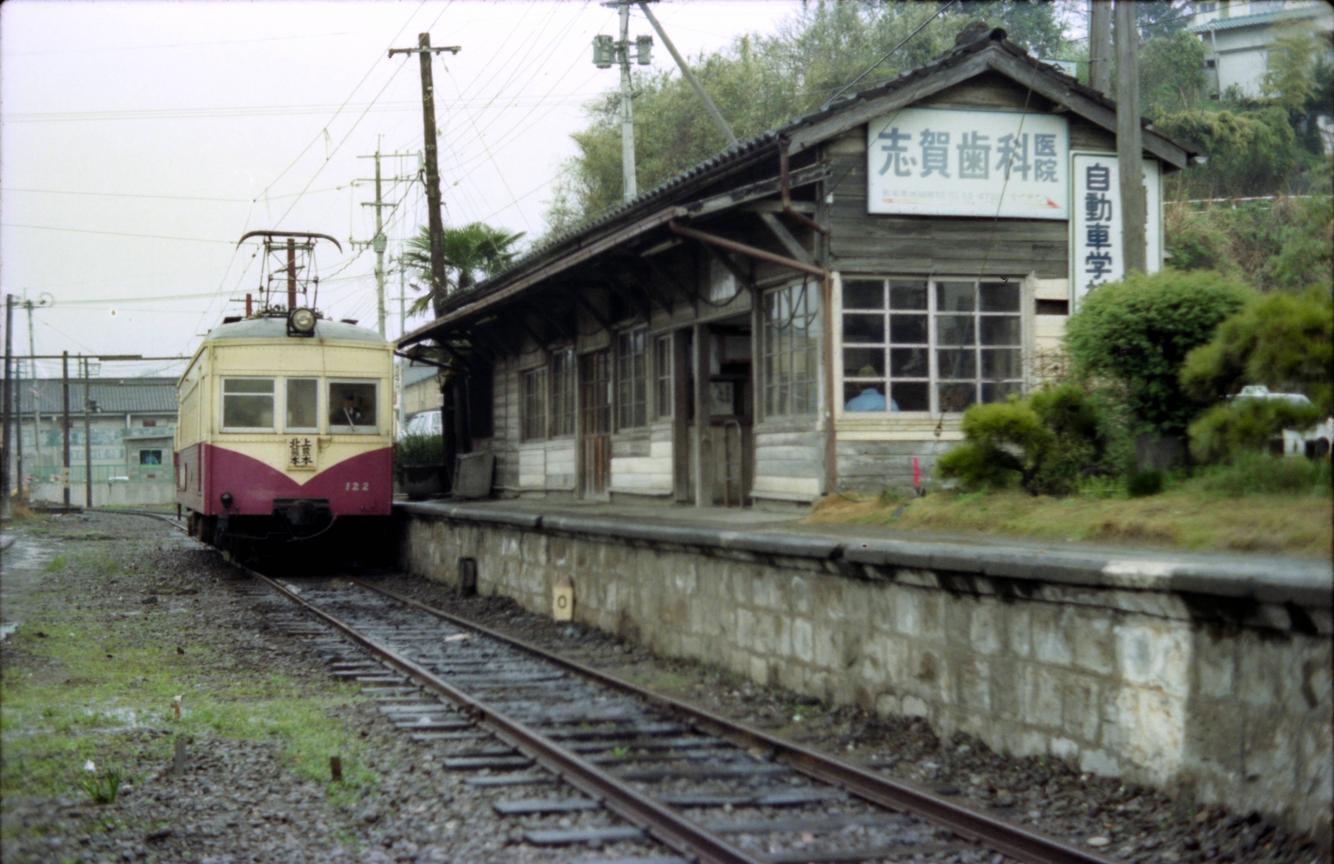 熊本電鉄 １００系？１２２号 上熊本駅にて